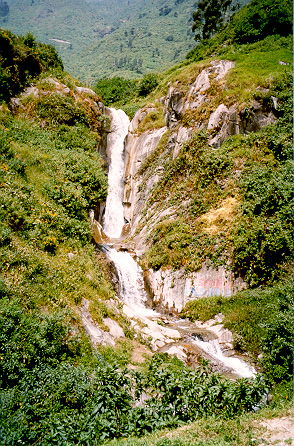 Catarata de Palacala, en las afueras de Lima, Perú